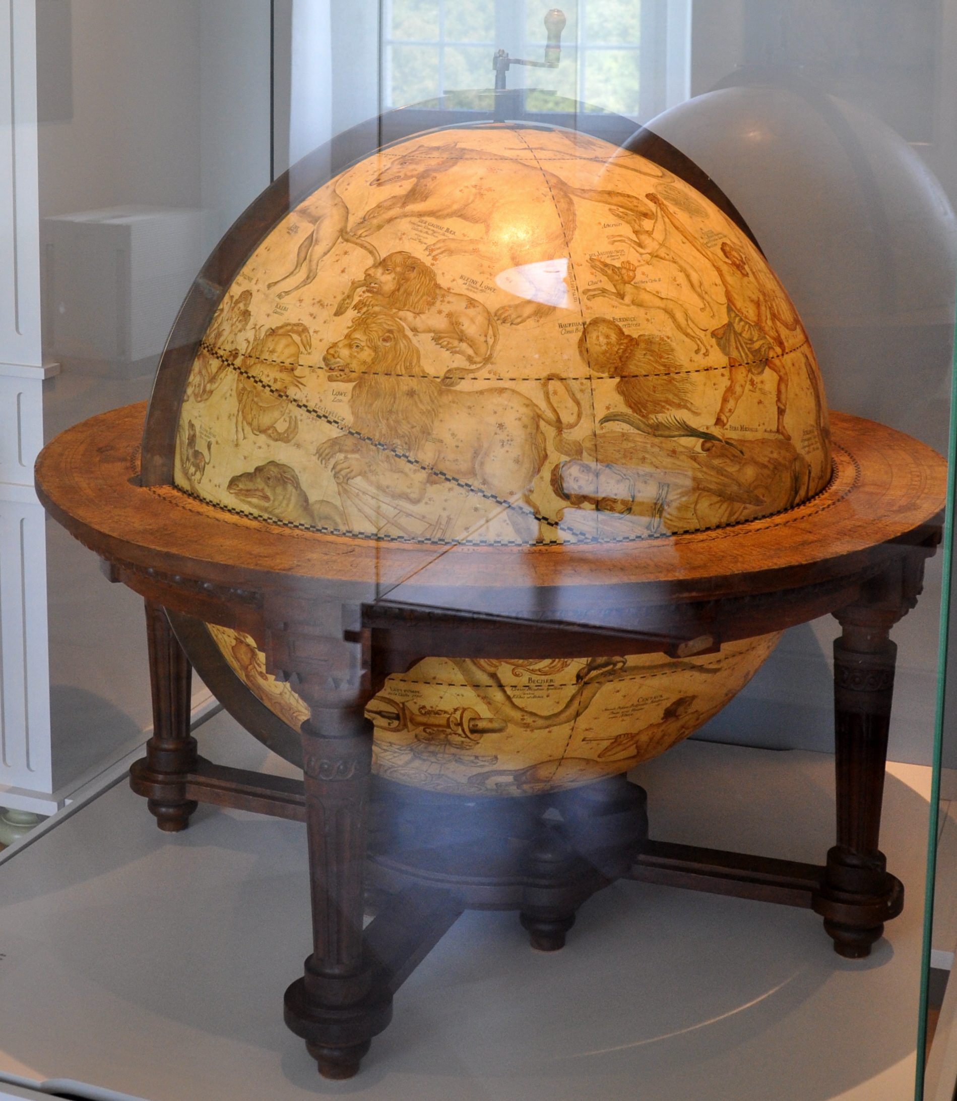 Himmelsglobus aus der Zisterzienser-Reichsabtei Salem, Gestell nach Entwürfen von Johann Georg Wieland, Salem, 1792–93; ausgestellt im Neuen Kloster Schussenried